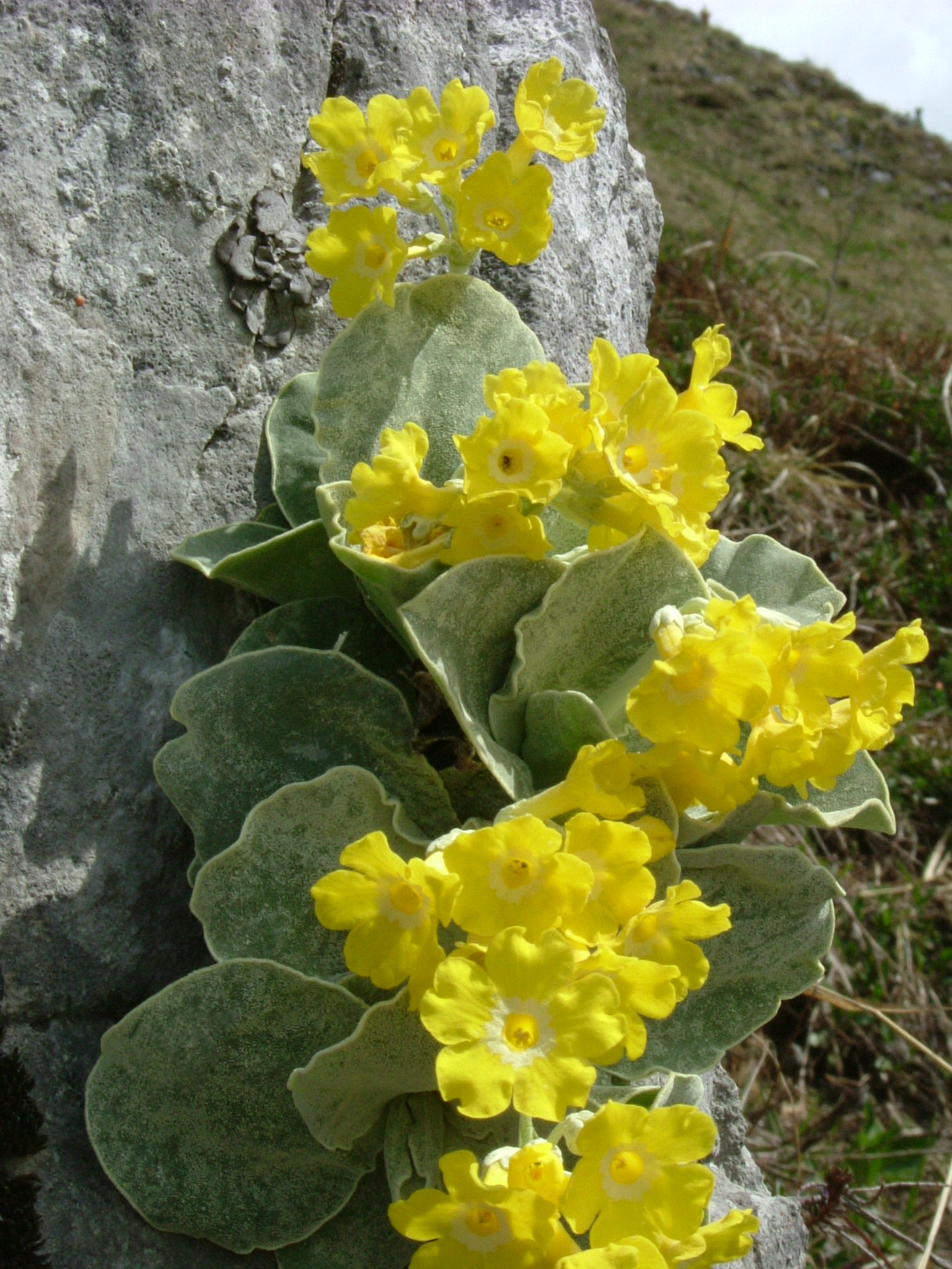 Aurikel (Primula auricula) am Jenner (Berchtesgadener Land)